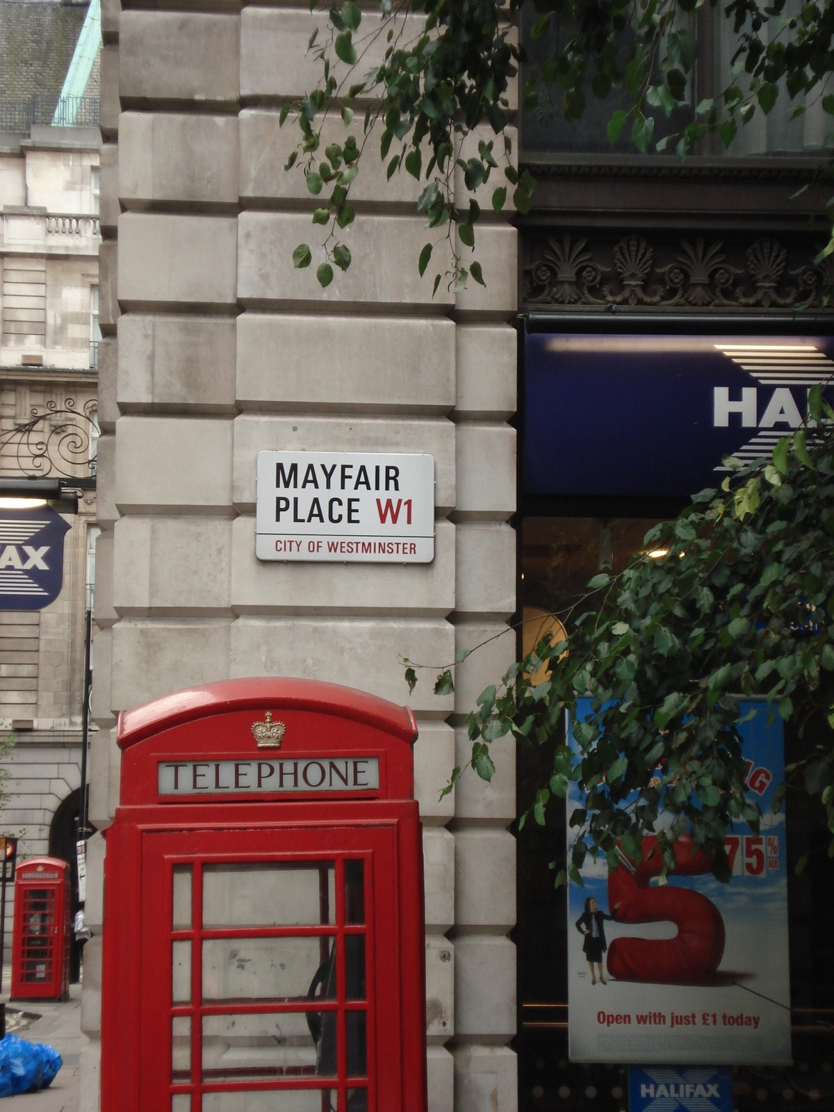 Mayfair Place (W1).